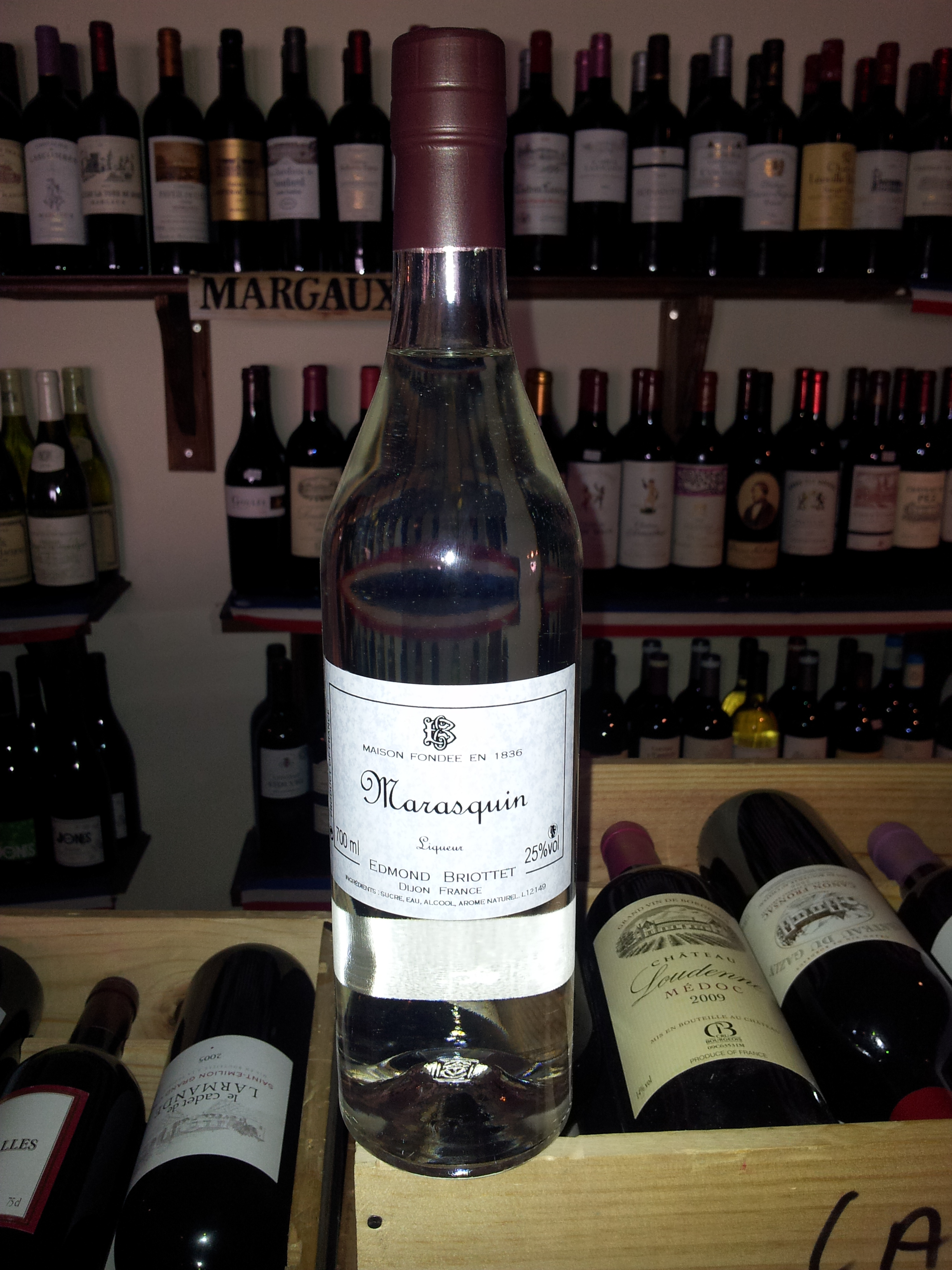 Marasquin Edmond Briottet Dijon